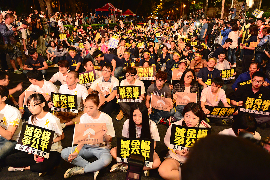 中文（台灣）: 巢運現場圖片